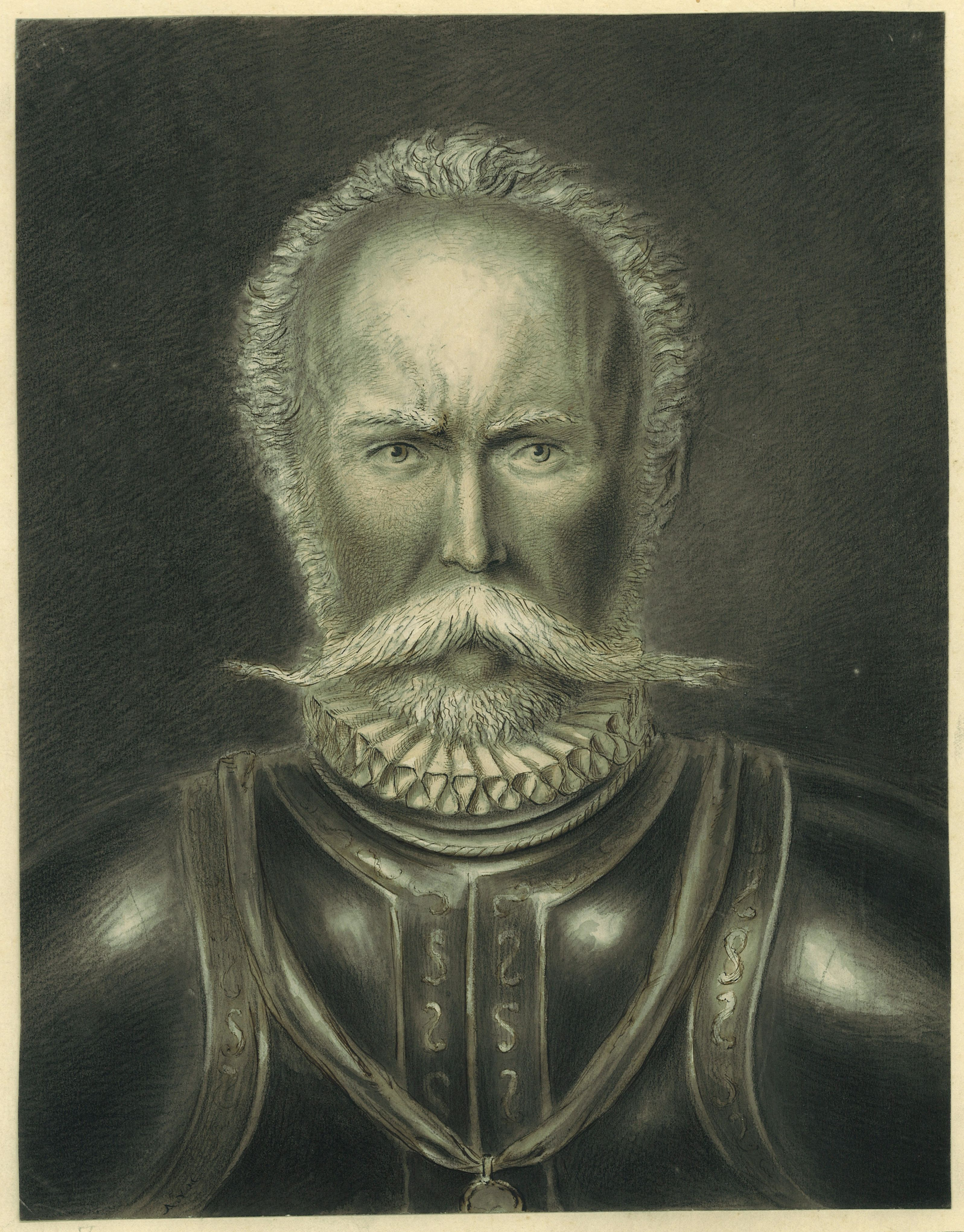 Vervaardiger: Alexander Ver Huell Datum: 1872 Inventarisnummer 889 uit het Familiearchief Van Foreest, Regionaal Archief Alkmaar Meer informatie over deze en andere prenten van Ver Huell